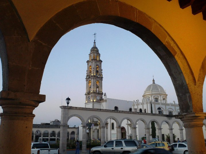 Uriangato en sus vistas diurnas desde el jardin